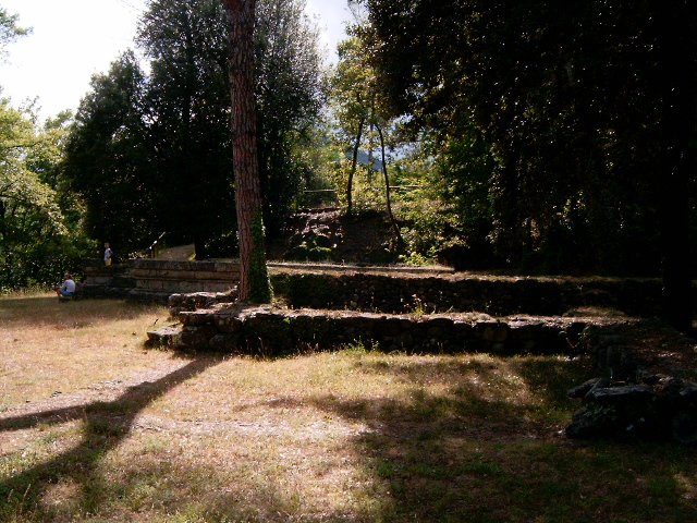 Marzabotto tempels Marzabotto temples